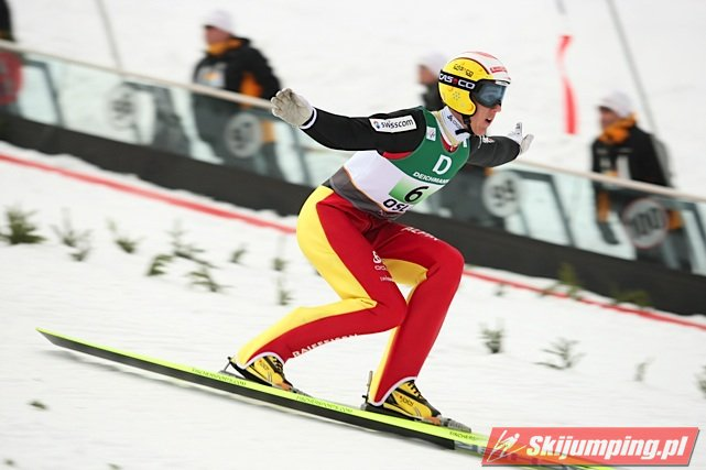 Andreas Küttel podczas konkursu drużynowego mężczyzn na skoczni normalnej podczas Mistrzostw Świata w Narciarstwie Klasycznym 2011 w Oslo.